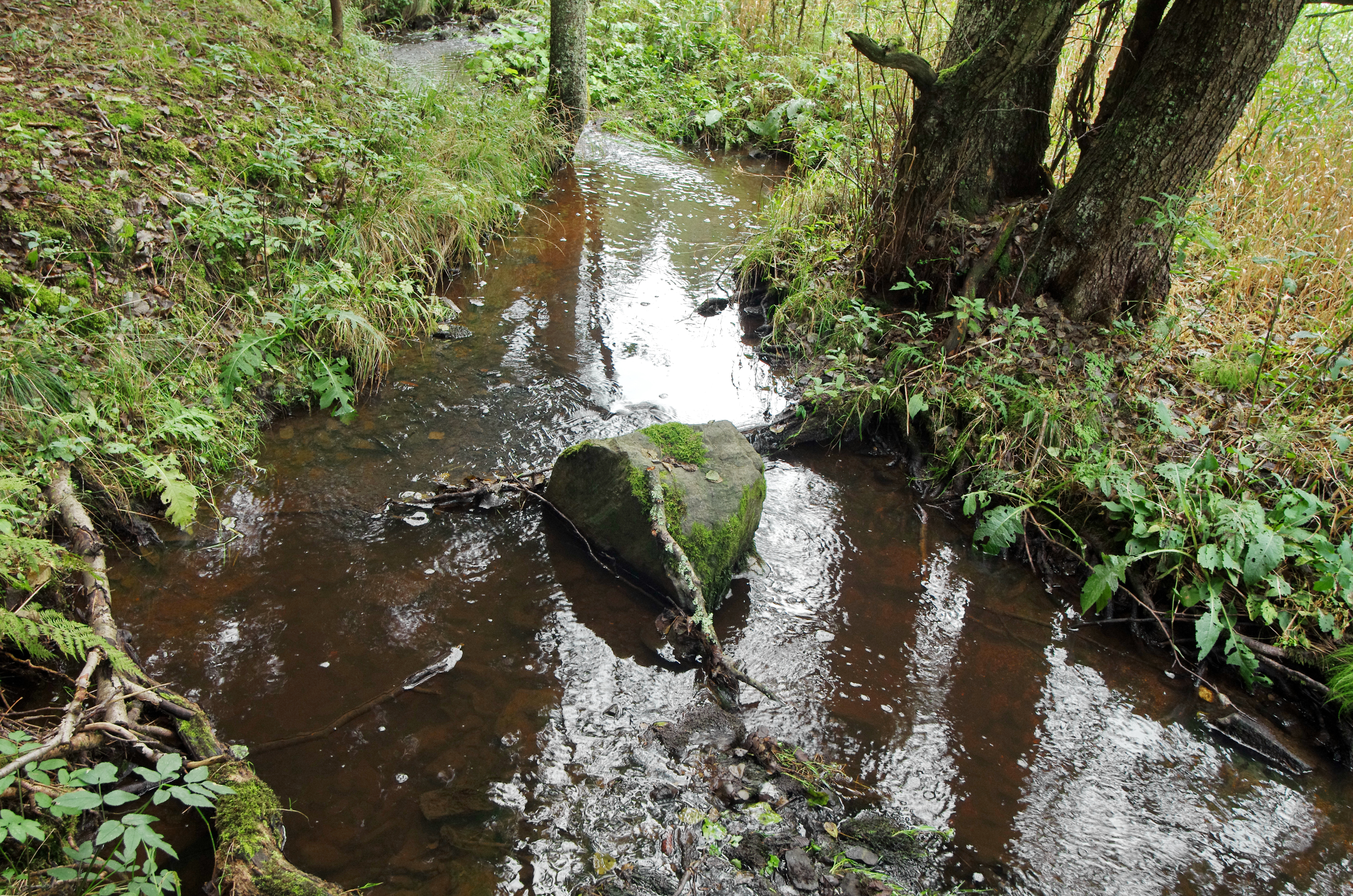 Potok Kyselka, přítok Pramenského potoka ve Slavkovském lese, v místě pod Grünskou kyselkou